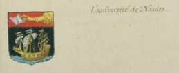 armorial universite Nantes